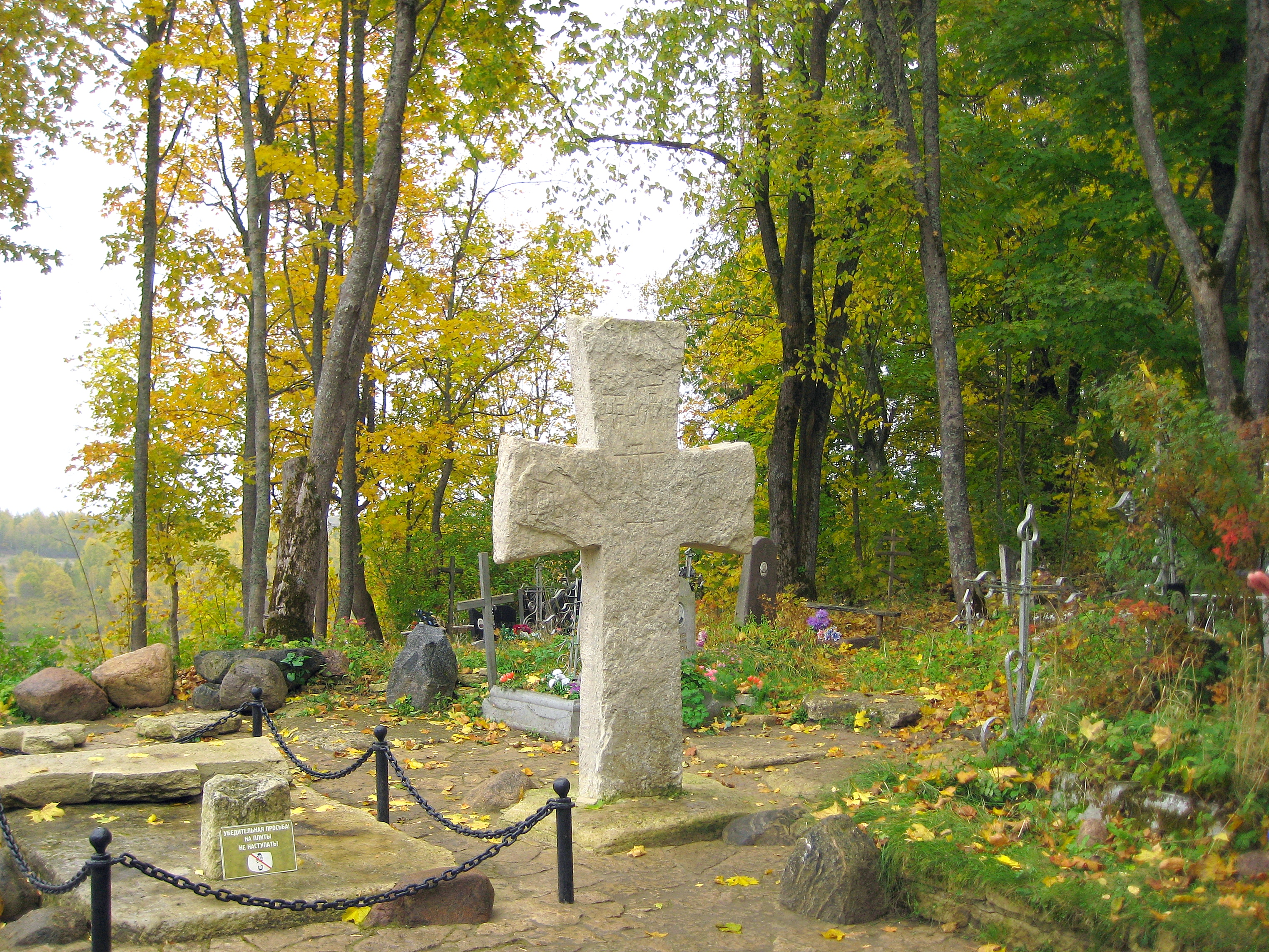 крепость Изборск (ансамбль Староизборской крепости и Труворова городища) (Псковская область, Печоры, село Старый Изборск, крепость)